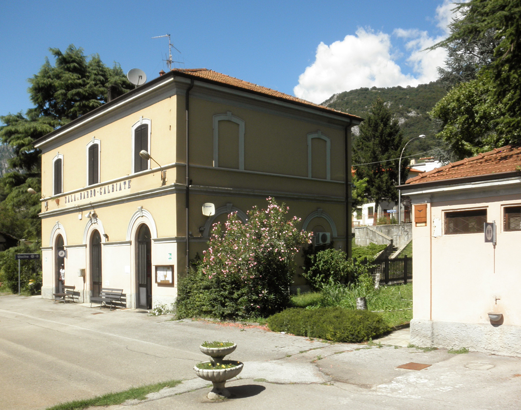 Stazione ferroviaria di Sala al Barro-Galbiate